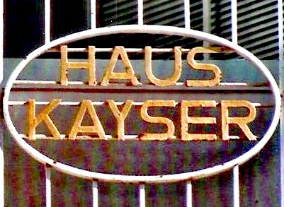 Beschriftung am Kayserhaus.